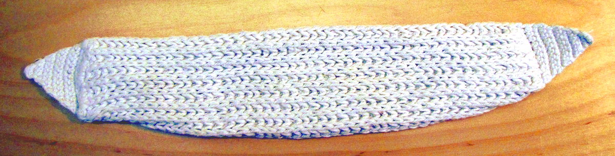 Hemstickad sanitetsbinda tillhörande Irma Rosell f. Bruhn (född år 1914) från Onsala, Halland, senare boende i Vänersborg.